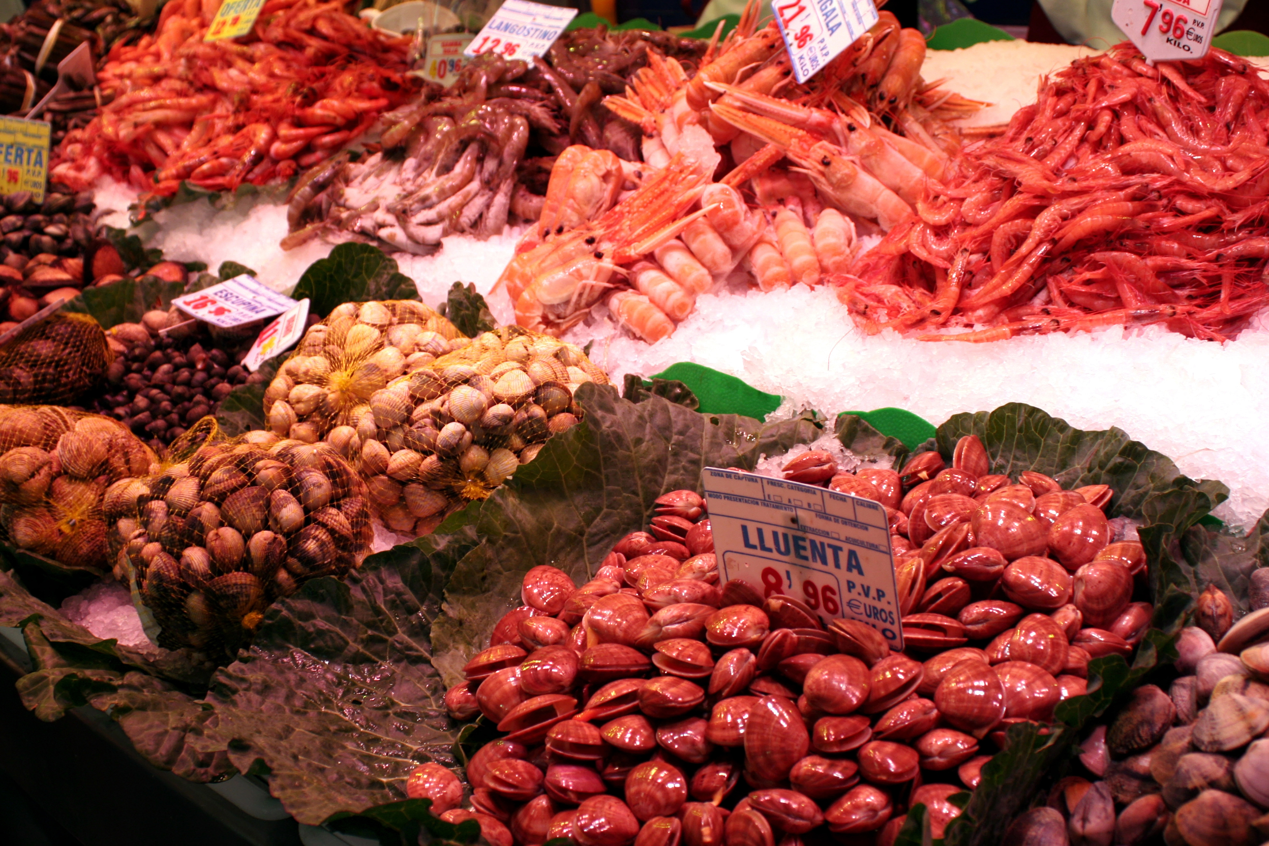 Angebot an Schalentieren (vorne: Muscheln, Meeresschnecken) sowie an Krustentieren (hinten) an einem Fisch-Verkaufsstand in Barcelona, Spanien.